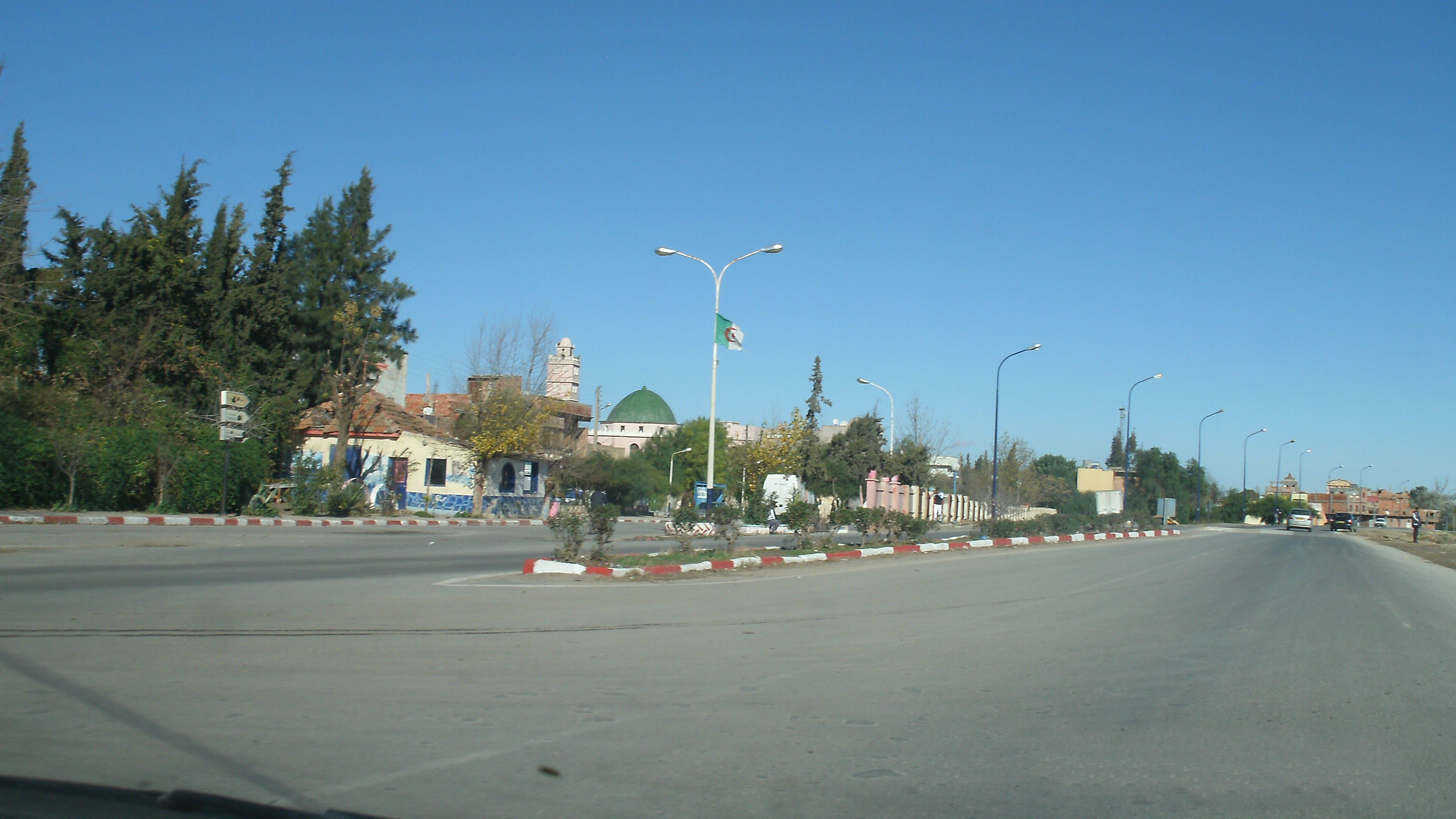 Sidi Lahcene dans la wilaya de Sidi Bel Abbes